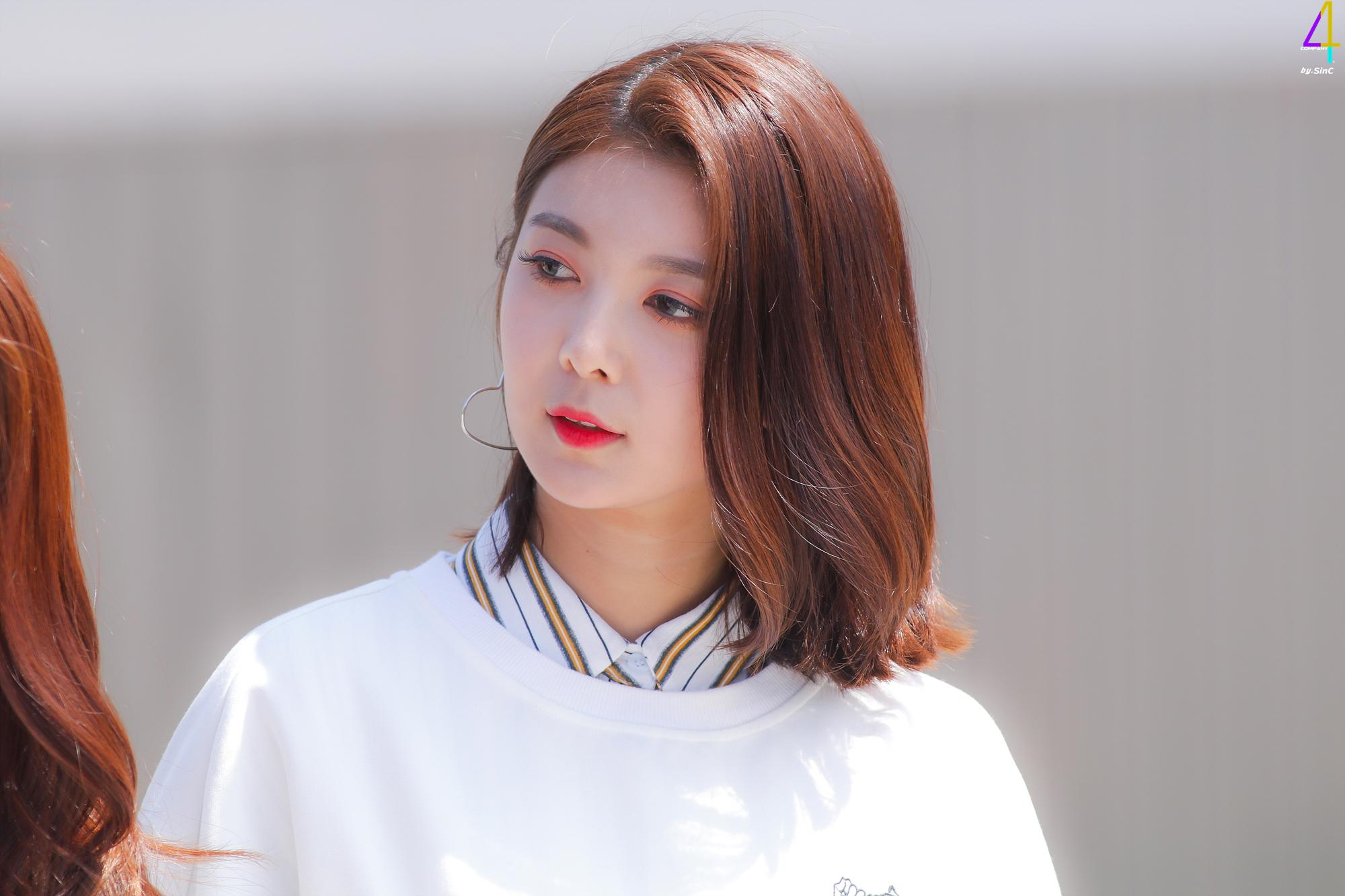 170908 드림캐쳐 뮤직뱅크 미니팬미팅